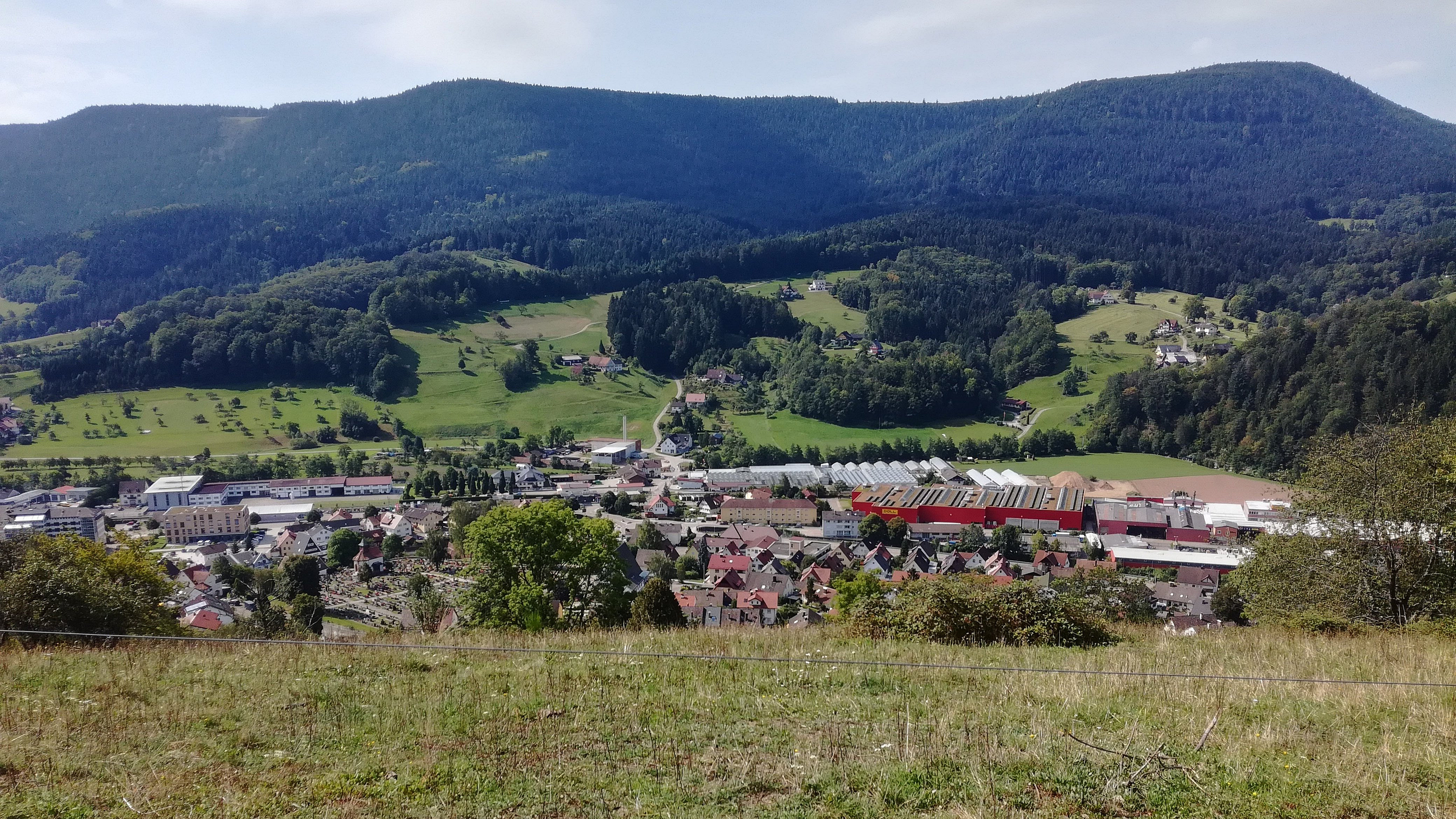 Teilansicht von Oppenau: Stadtgebiet entlang der Straßburger Straße unterhalb Ortskern, Blick von der Kleinebene Richtung Nordosten; September 2019